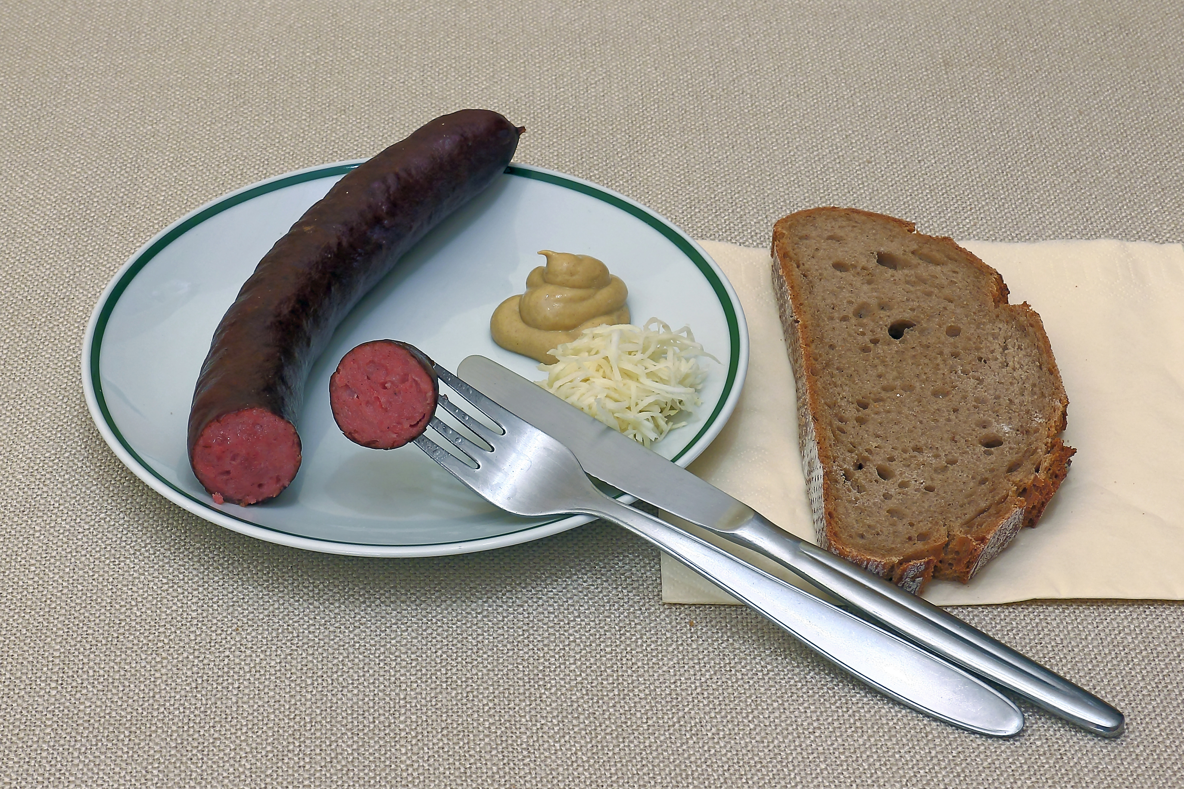 Die Waldviertler Wurst ist eine stark geräucherte Brühwurst mit dicker Haut, dazu dunkles Brot, Senf und gerissener (geriebener) Kren